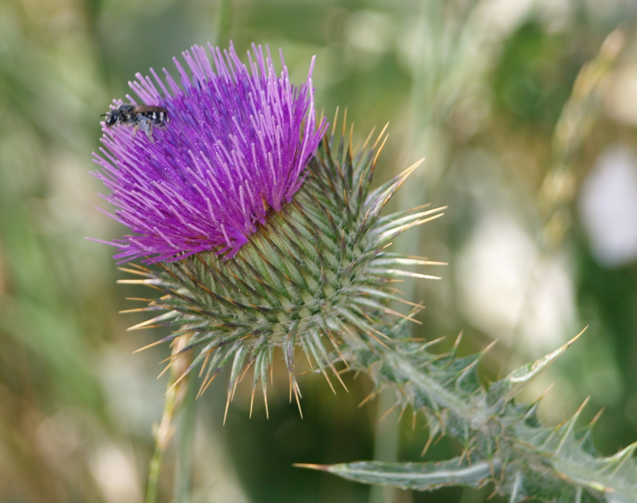 Flor del Cardo